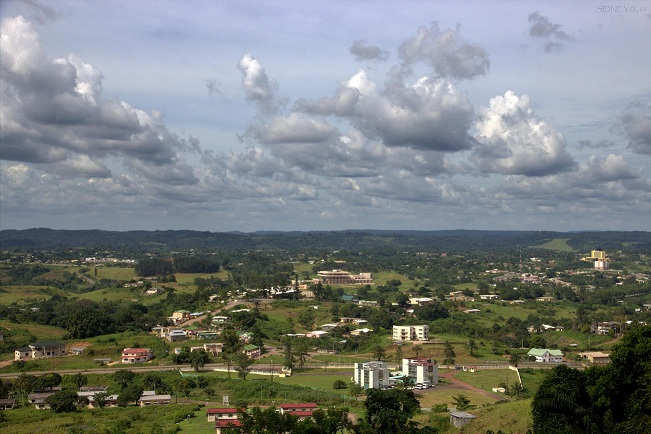 Vue de Franceville prise depuis la statue de Pierre Savorgnan De Brazza